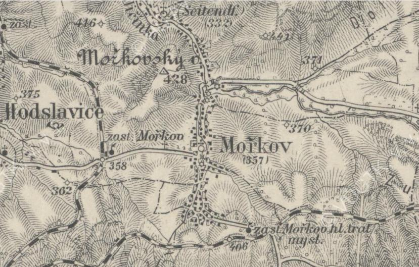 Mořkov na mapách III. vojenského mapování, které probíhalo ve druhé polovině 70. let 19. století.